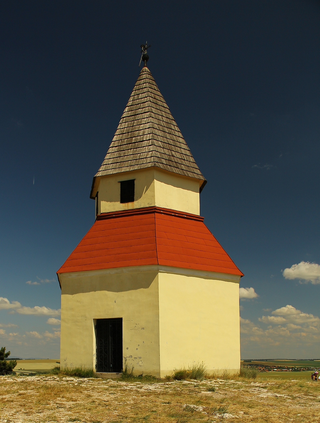 Kaplnka krížovej cesty